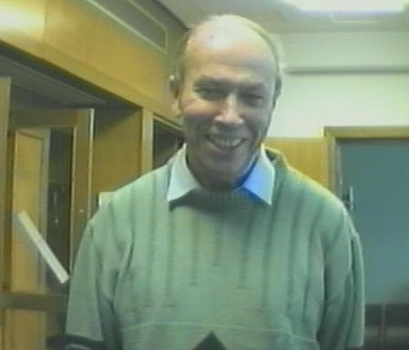 Vyacheslav Ivanovich Lebedev, 1995